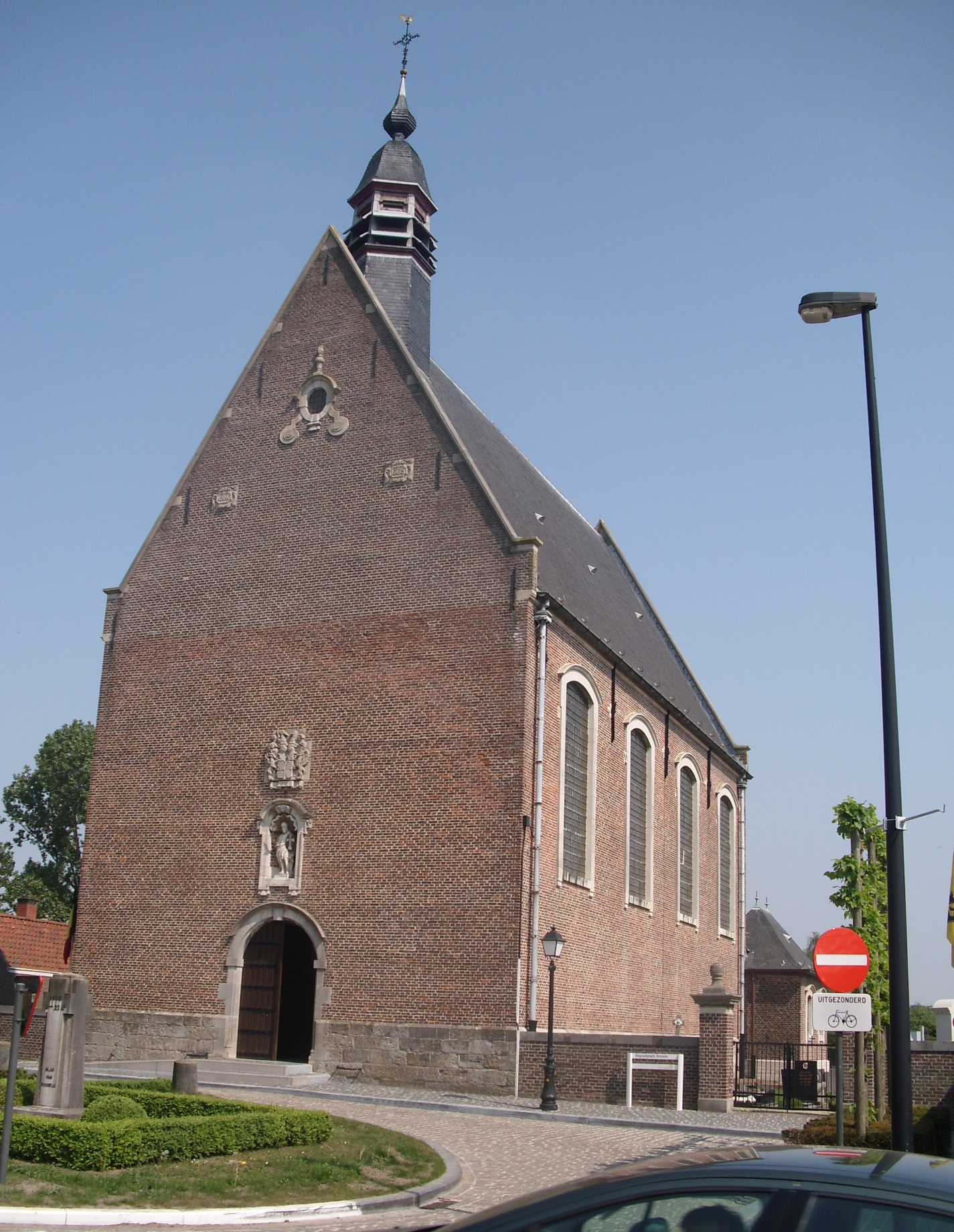 Sint-Gengulphuskerk - Kerkplein - Ronsele - Zomergem - Oost-Vlaanderen - Vlaams Gewest - België